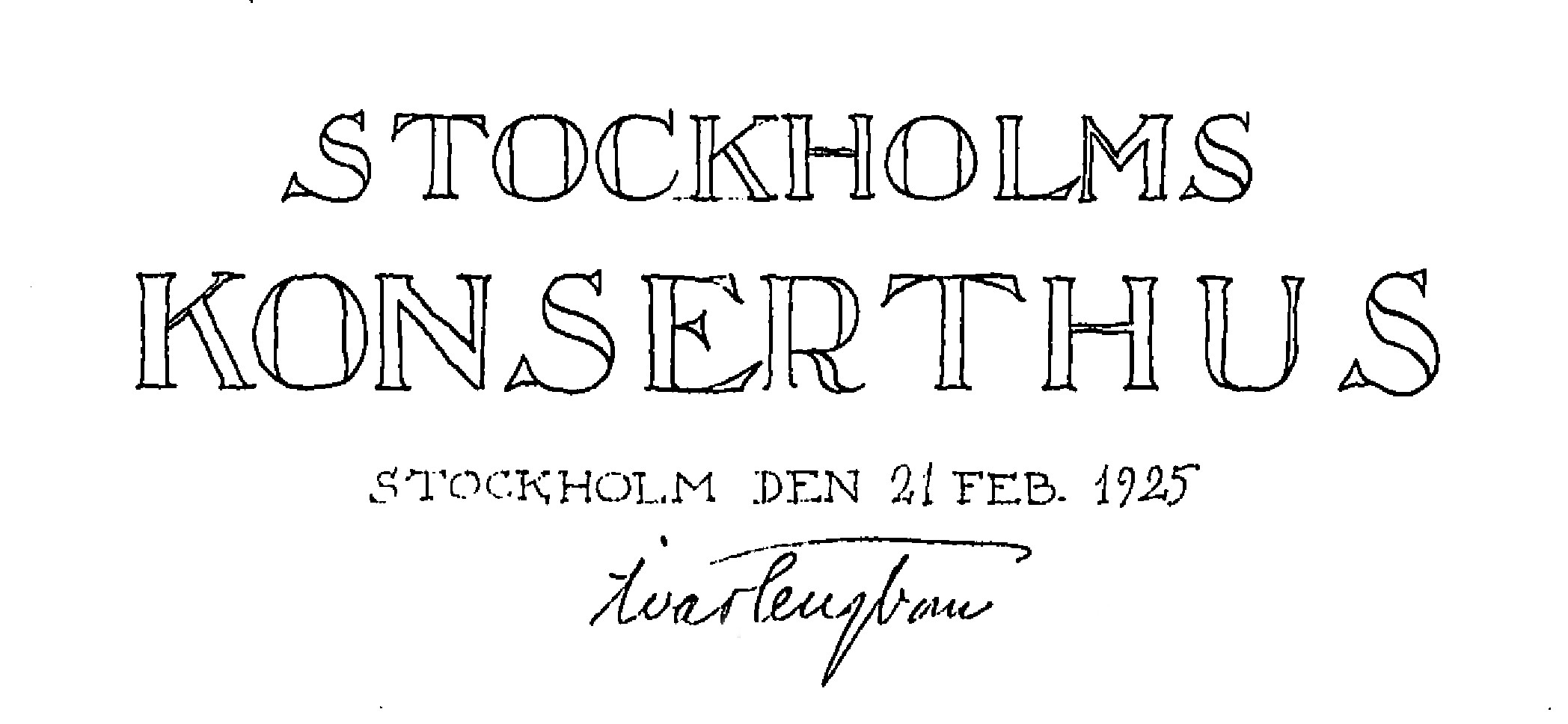 Ritningsstämpel till Stockholms Konserthus